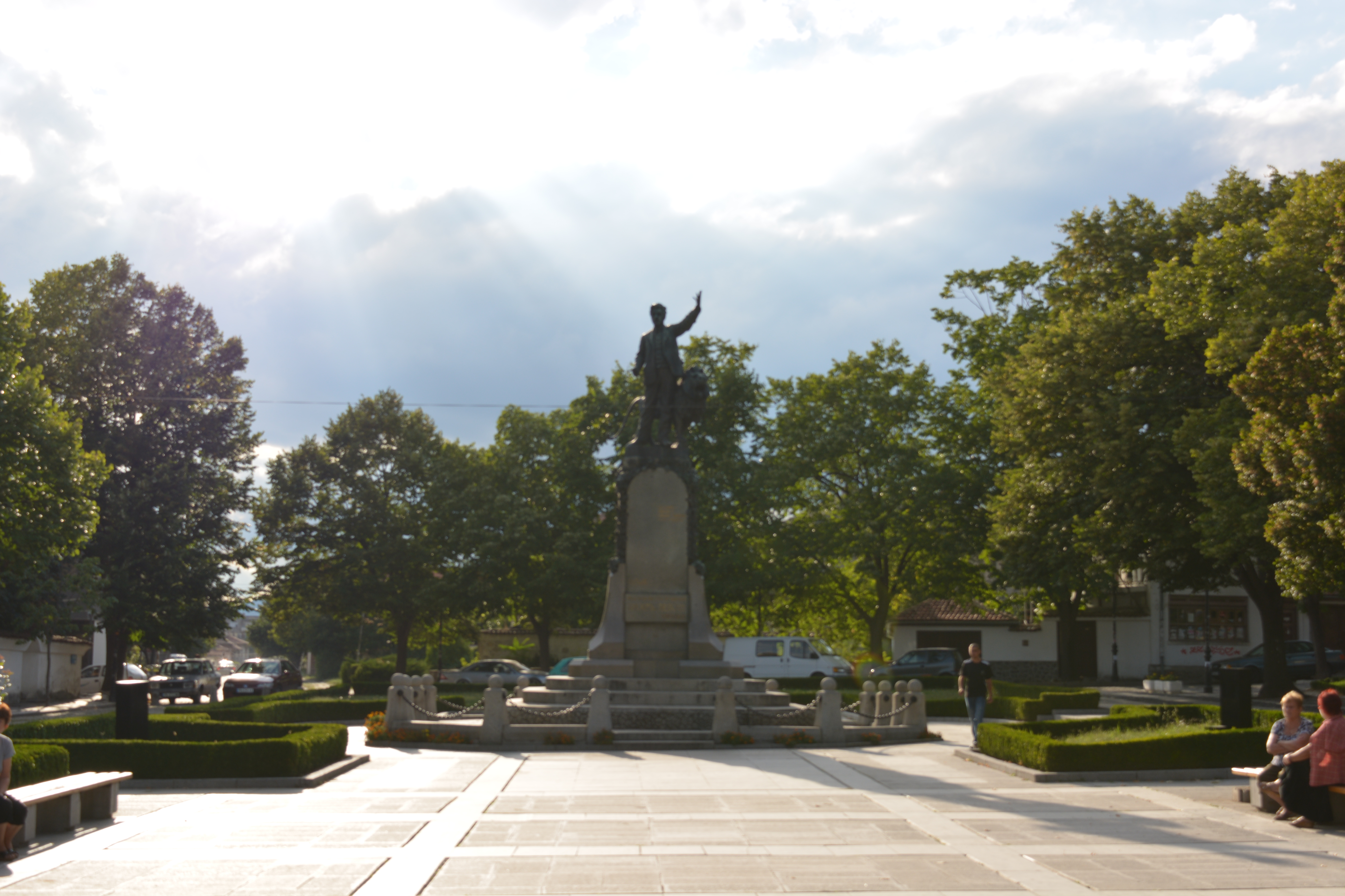 Паметник на Васил Левски